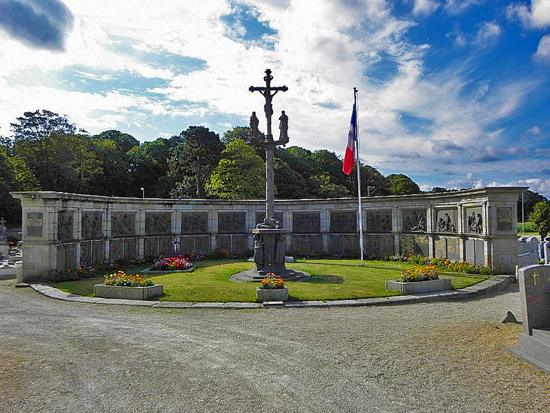 Monument aux morts de Saint-Pol-de-Léon (29). Architecte: Charles Chaussepied (1866-1930). Sculpteur des stations du chemin de Croix: Yann Larhantec (1829-1913). Sculpteur du monument: par René Quillivic (1879-1969).